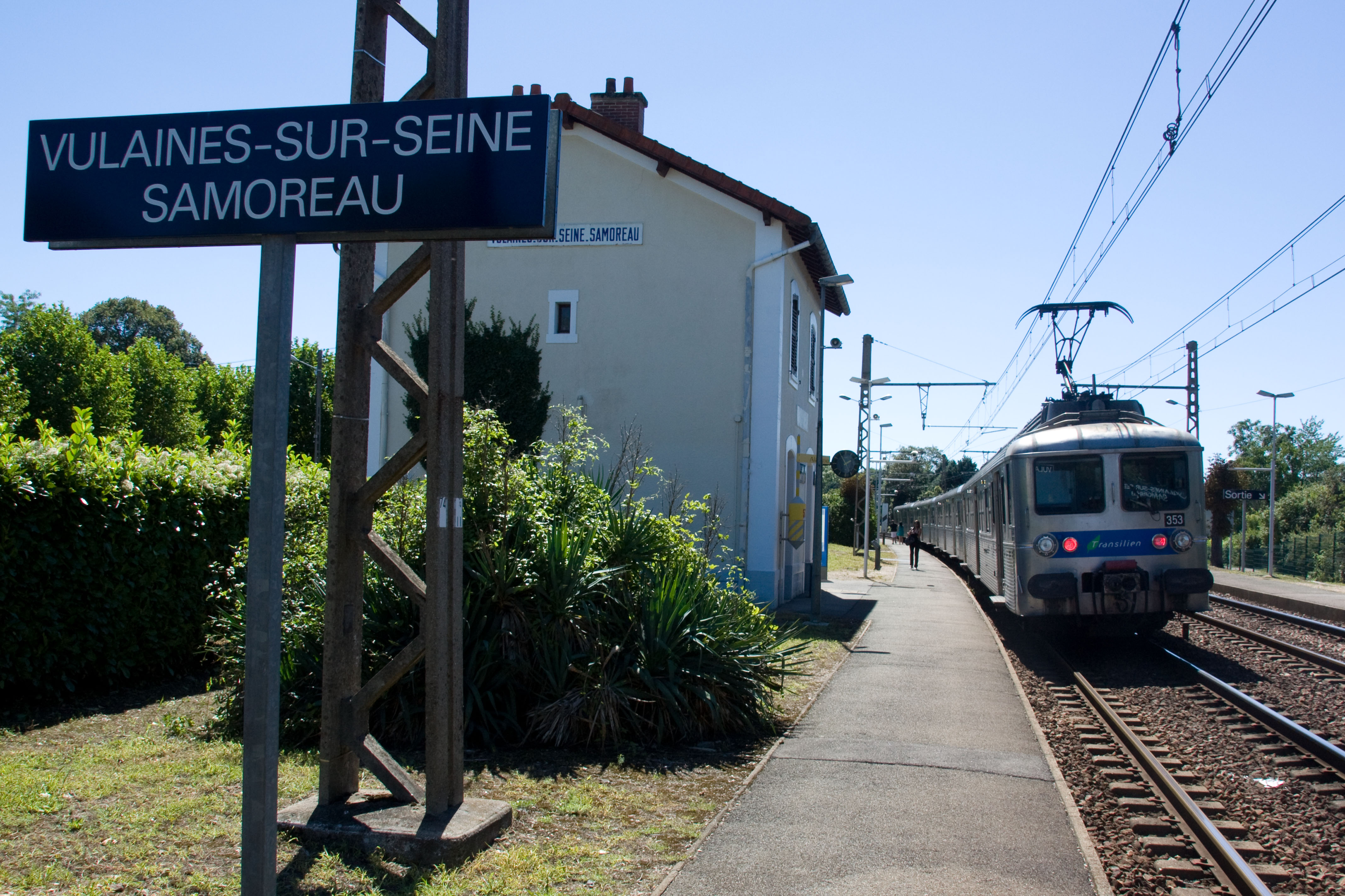 Gare de Vulaines-sur-Seine - Samoreau, Vulaines-sur-Seine, Seine-et-Marne, France